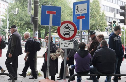 Kaiser-Ludwig-Platz